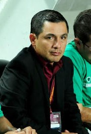 Néstor Rodriguez - Director técnico de fútbol profesional